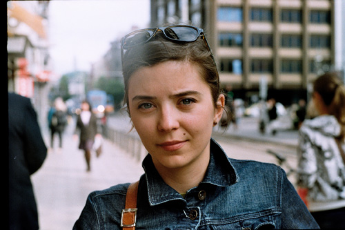 Белослава Димитрова, интервю в Портал Култура